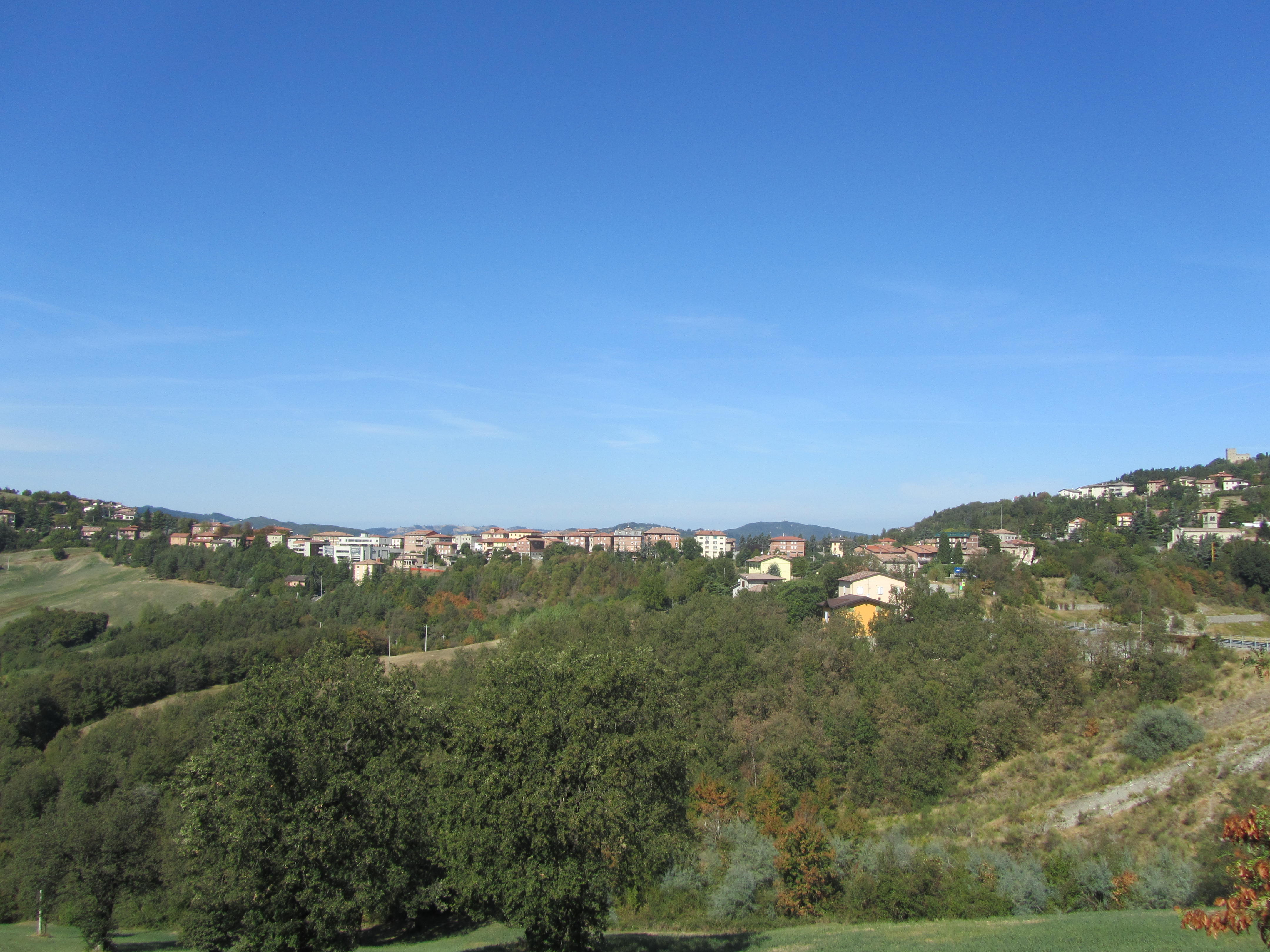 Panorama di Baiso, provincia di Reggio Emilia.